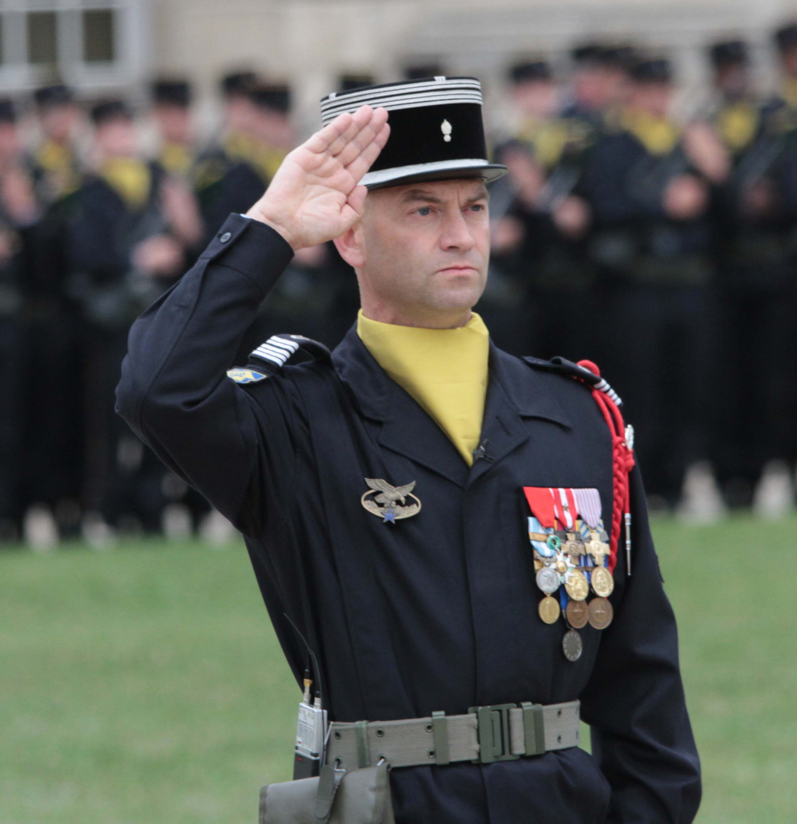 Colonel Geoffroy de Larouzière au Château de Vincennes le 17/09/11